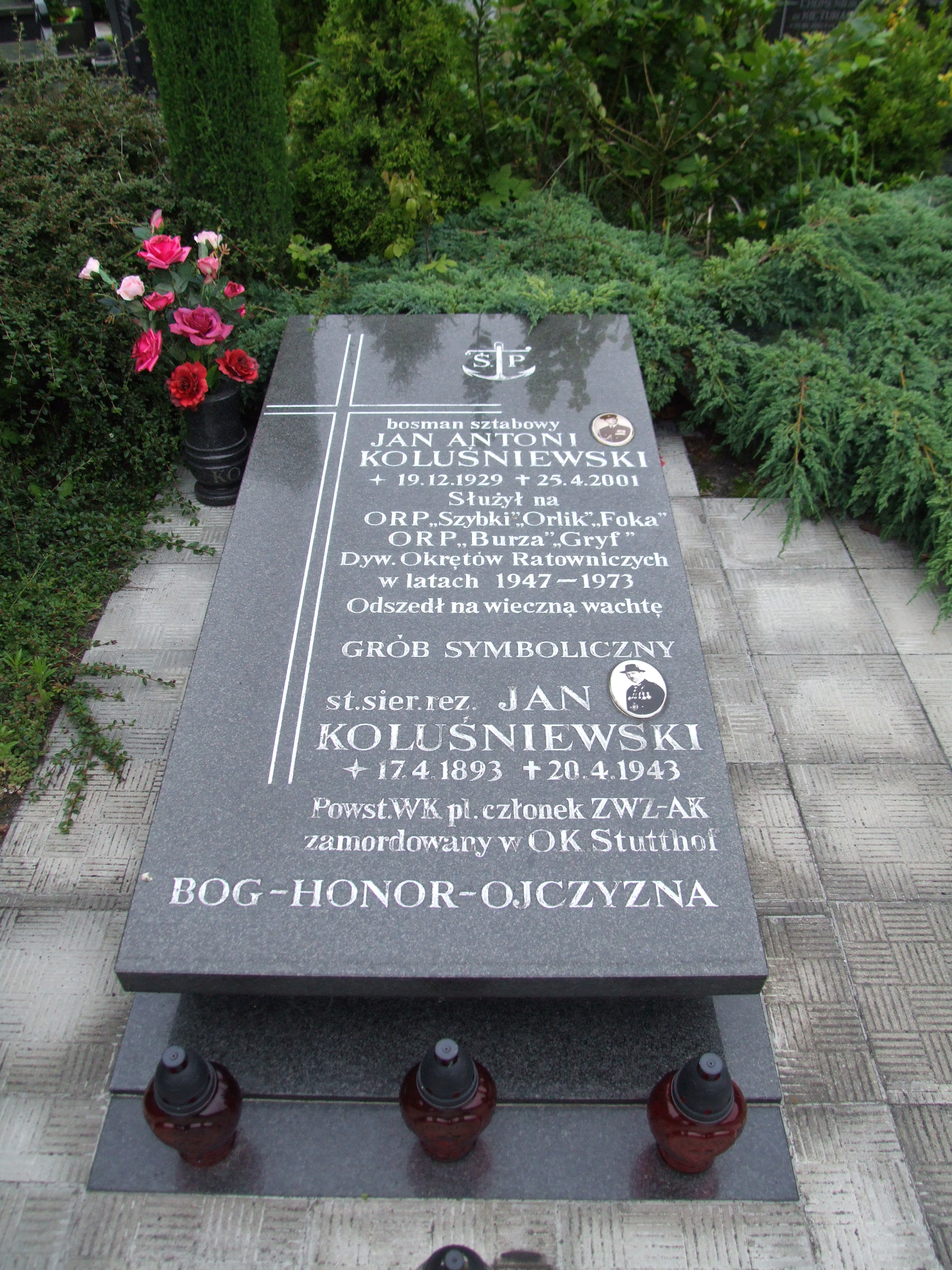 Gdynia-Oksywie Cmentarz Marynarki Wojennej